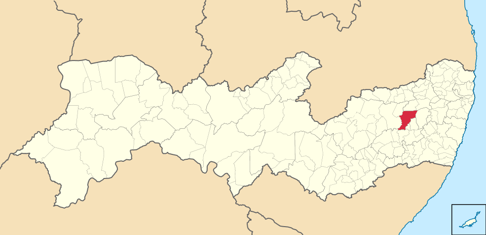 Mapa de Bezerros (2)